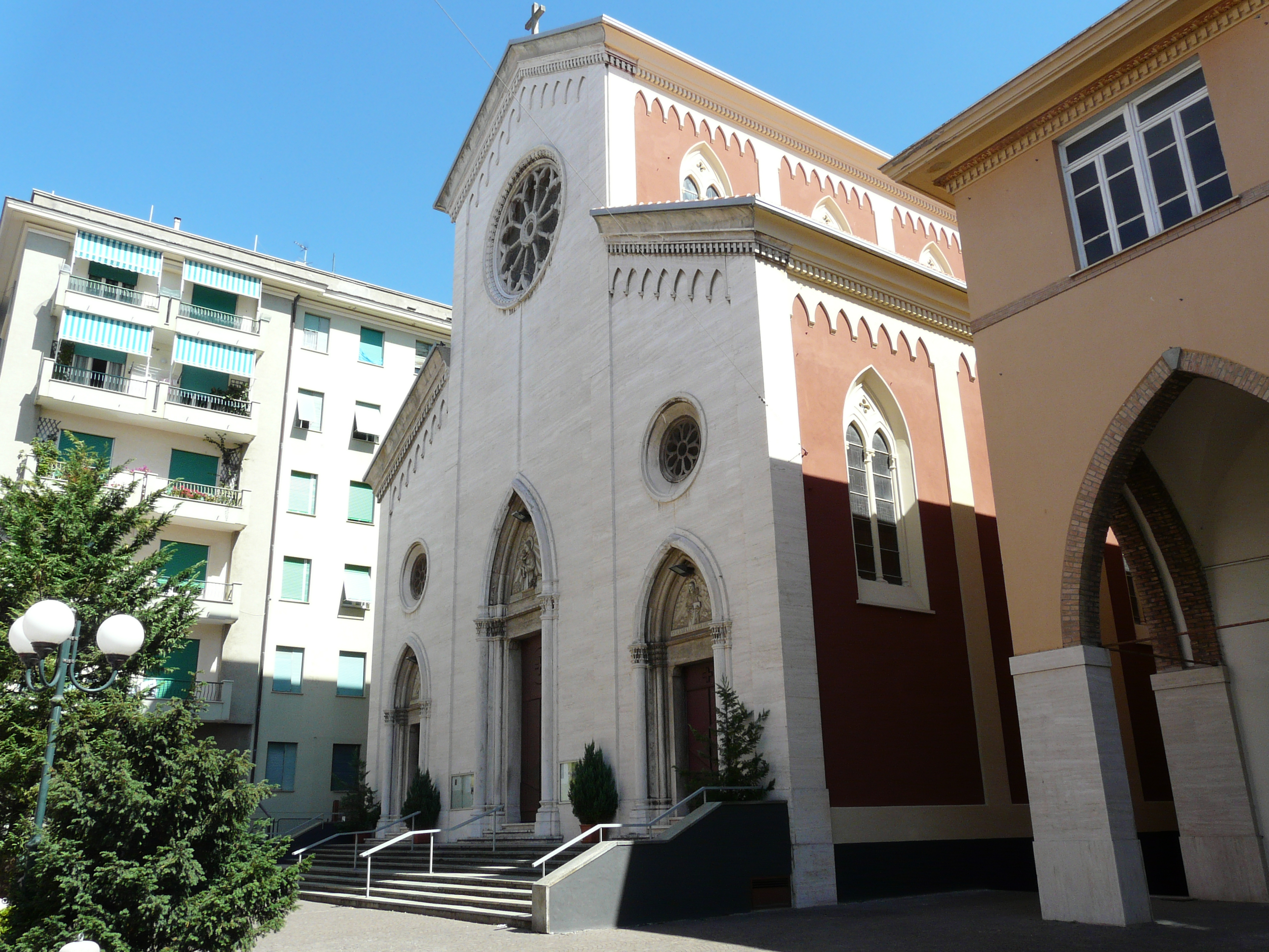 Santuario e convento di Sant'Antonio da Padova, Chiavari, Liguria, Italia